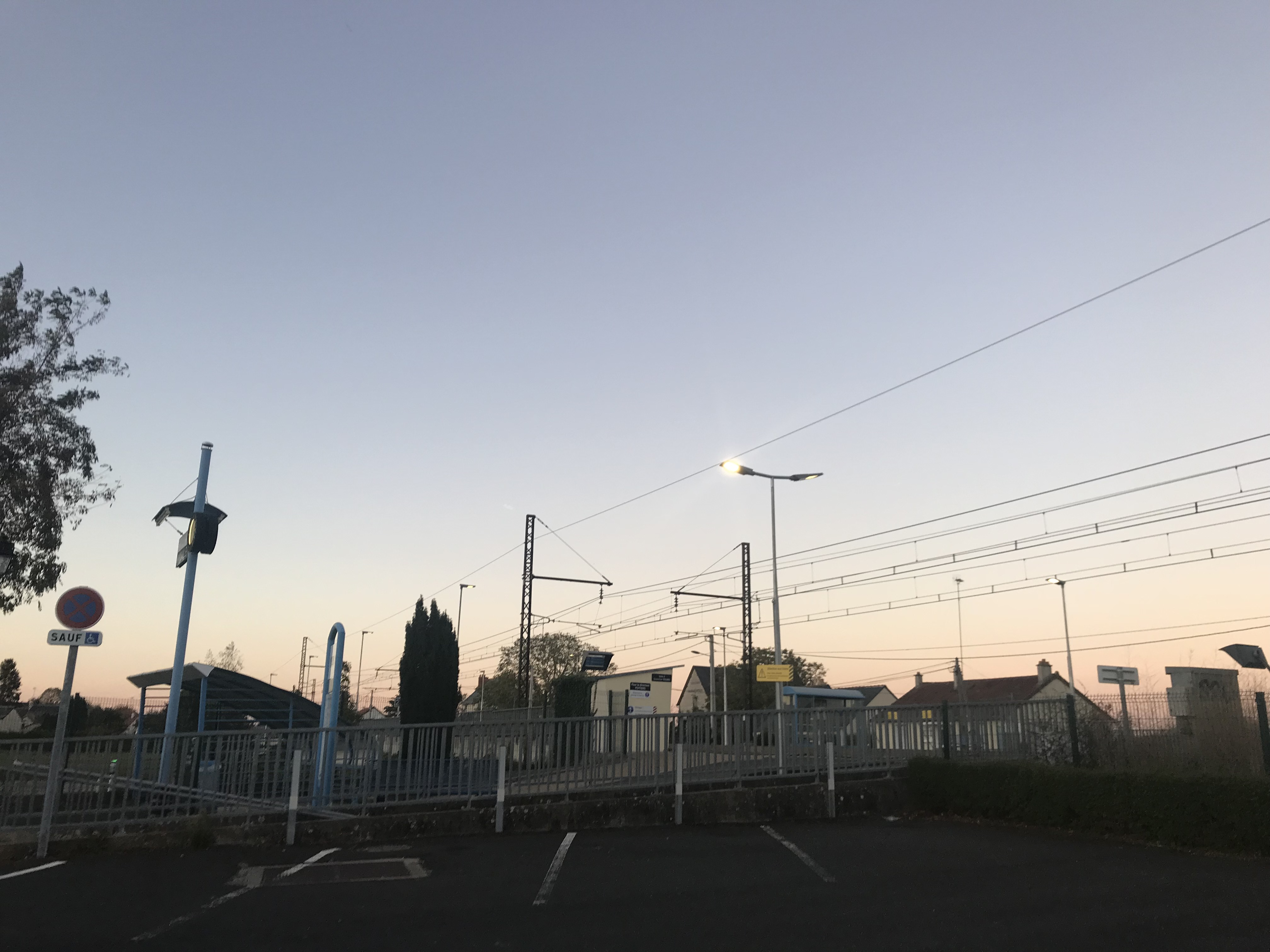 Gare de Maillé (37)